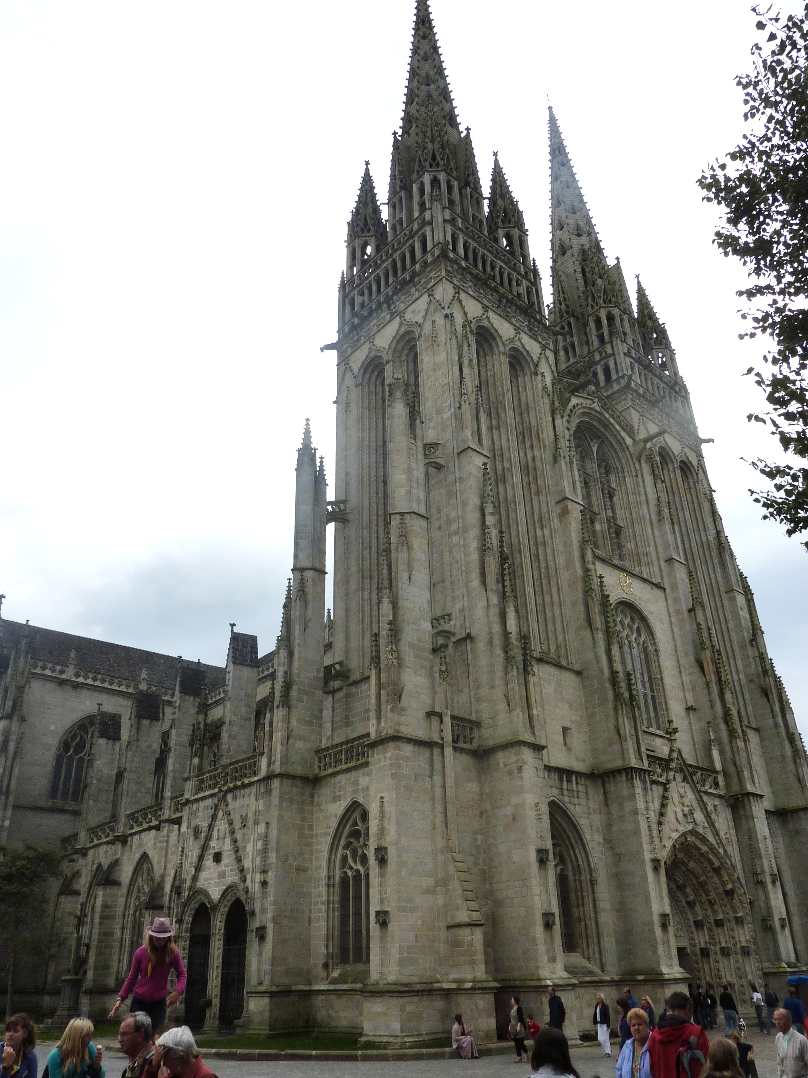 Cathédrale Saint-Corentin de Quimper : la façade ouest vue du nord-ouest